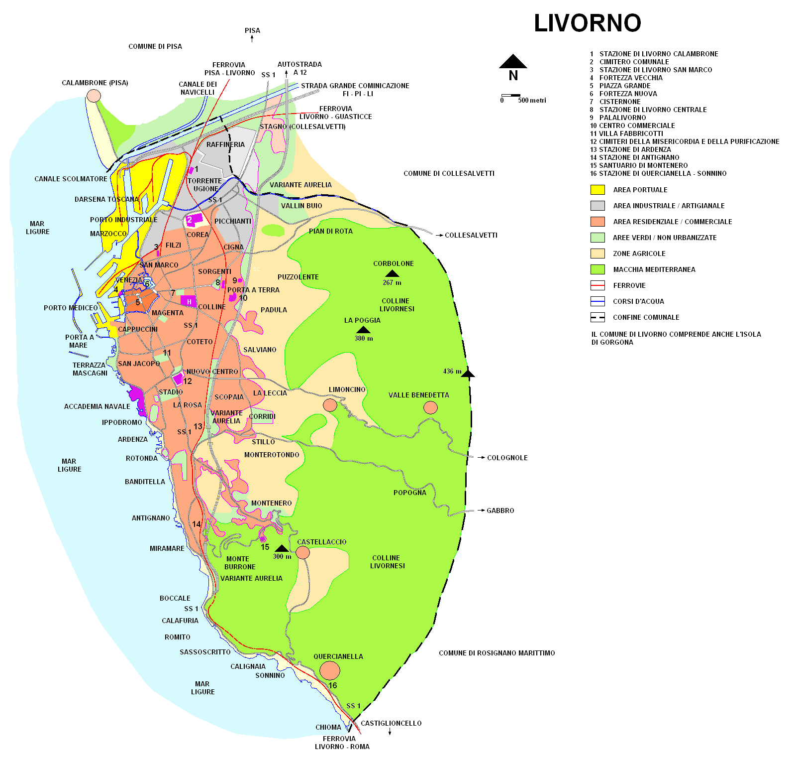 Livorno: planimetria indicativa della città e dei dintorni.